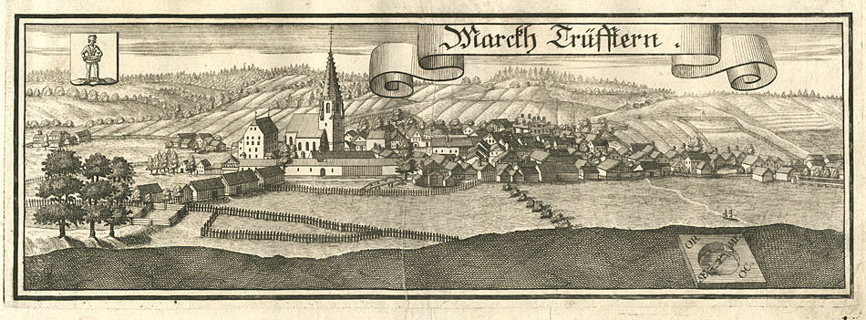 "Marckh Trüfftern" (Triftern), aus: Beschreibung des Churfürsten- u. Hertzogthumbs Ober- und Nidern Bayrn. Rentamt Landshut. – Gericht Pfarrkirchen, 1723